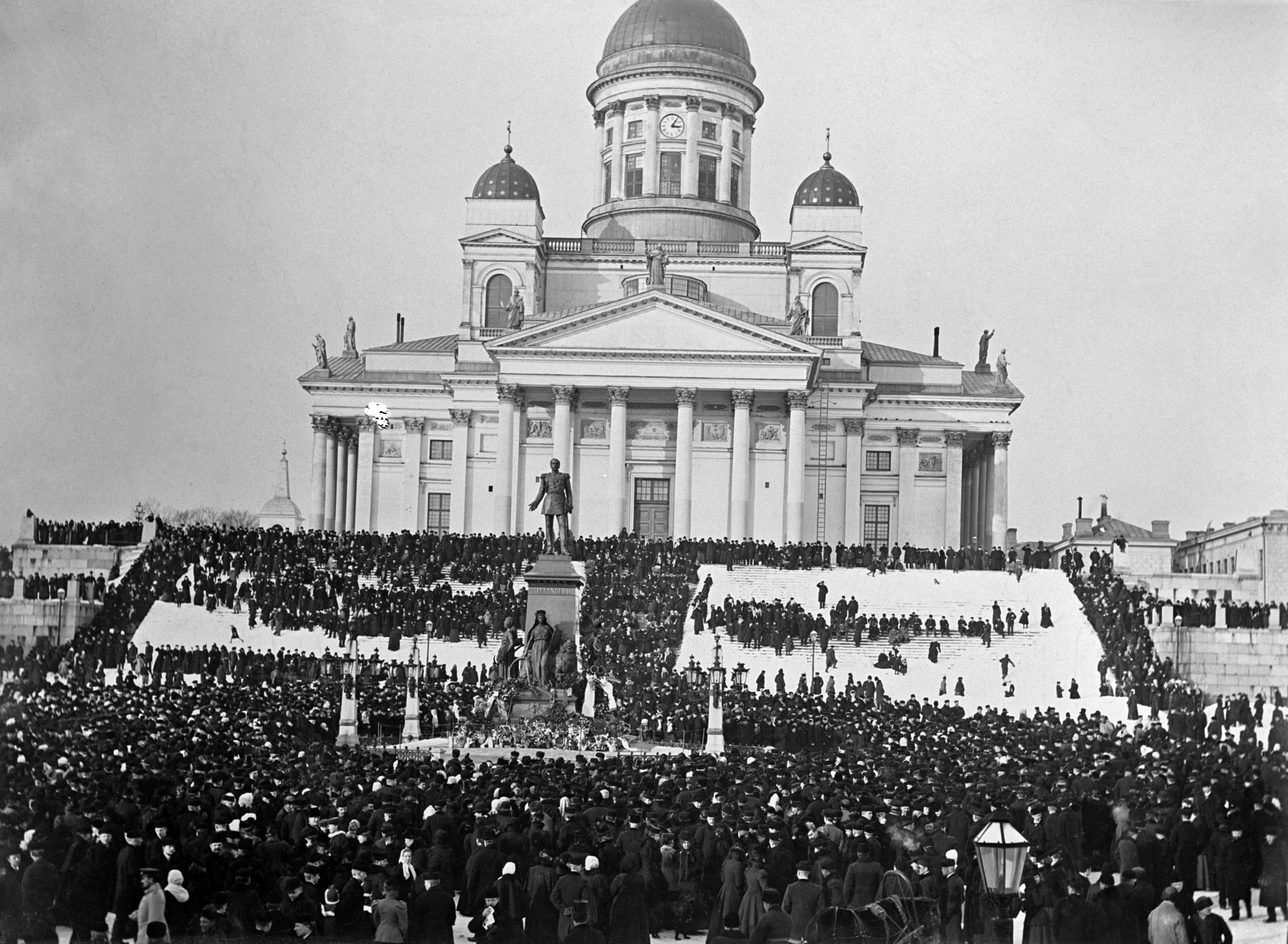 Mielenosoitus Helmikuun manifestia vastaan Senaatintorilla 13.3.1899